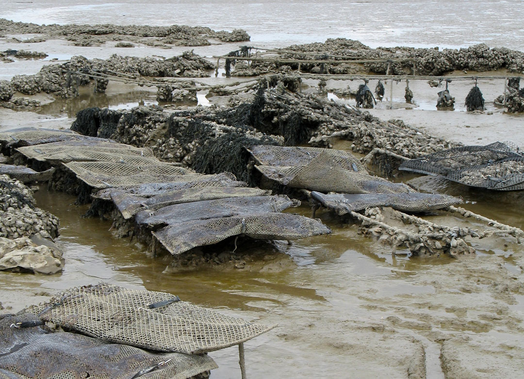 Huitres sur une plage de Fouras, France